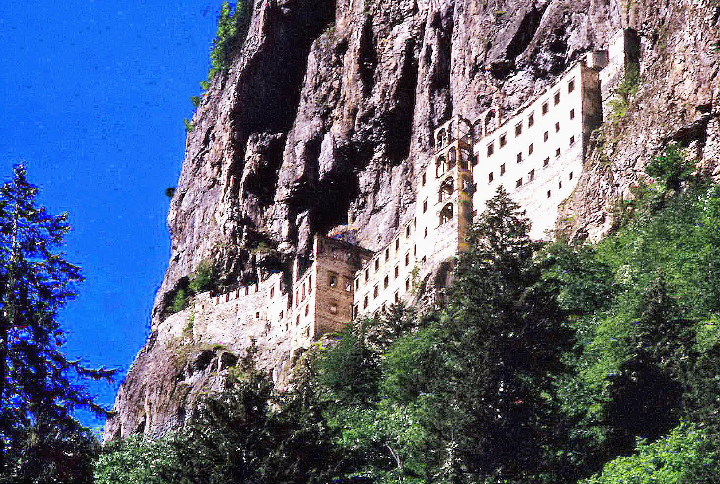 Sumela